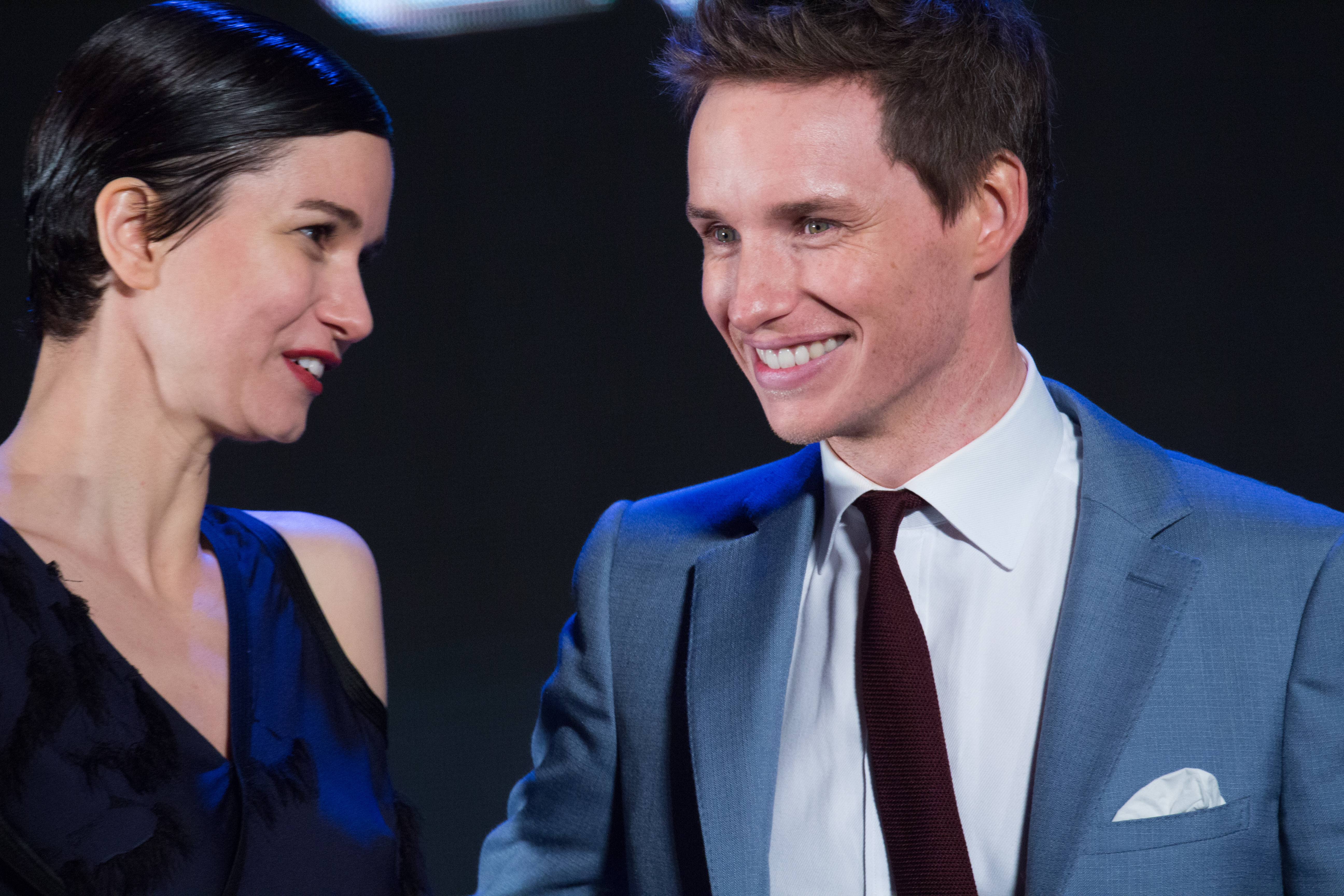 ファンタスティック・ビーストと魔法使いの旅 ジャパン・プレミア レッドカーペット エディ・レッドメイン キャサリン・ウォーターストン